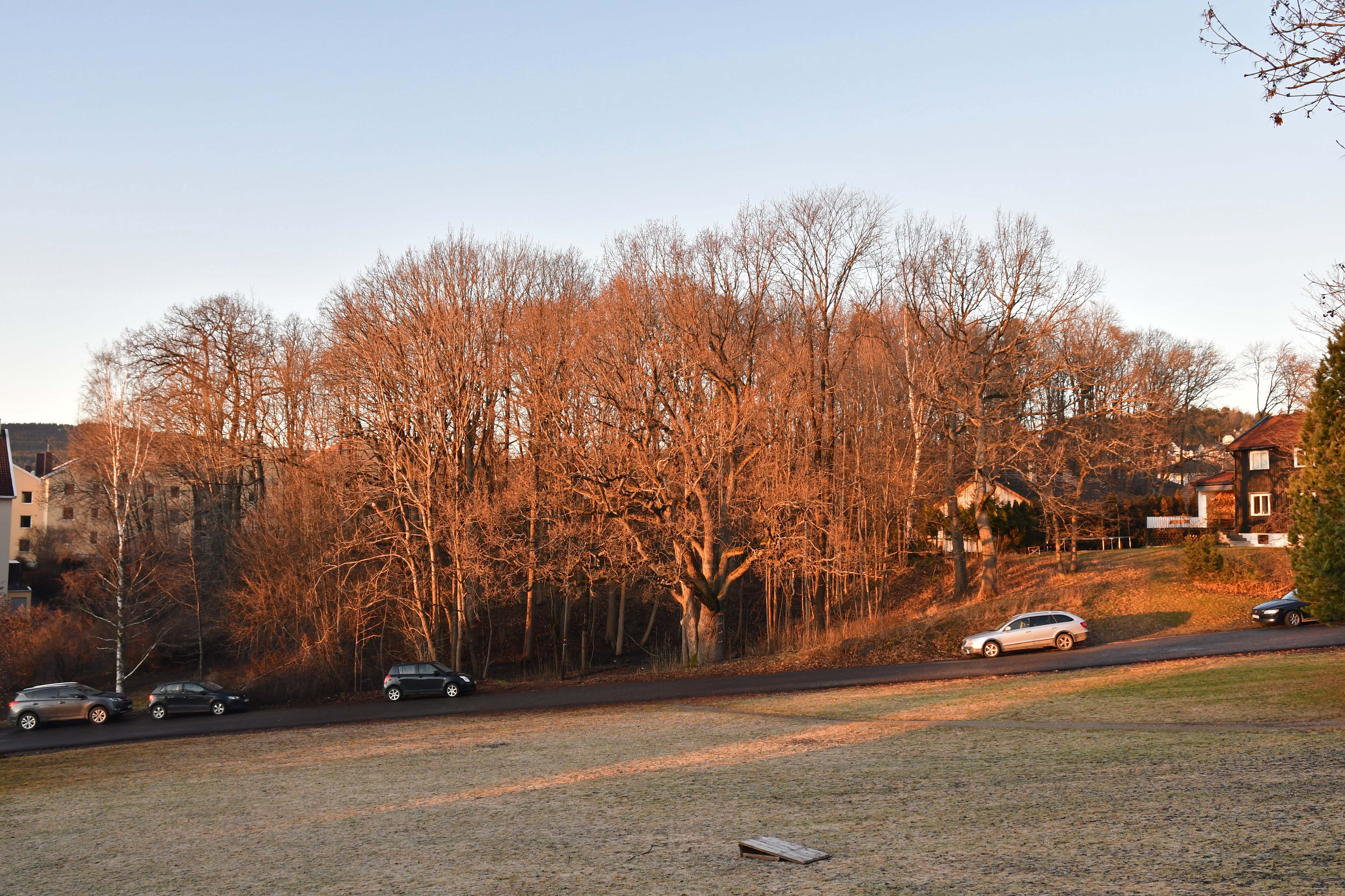 Lunden på Søndre Tåsen gård, sett mot nord fra marken bak Bakkehaugen kirke